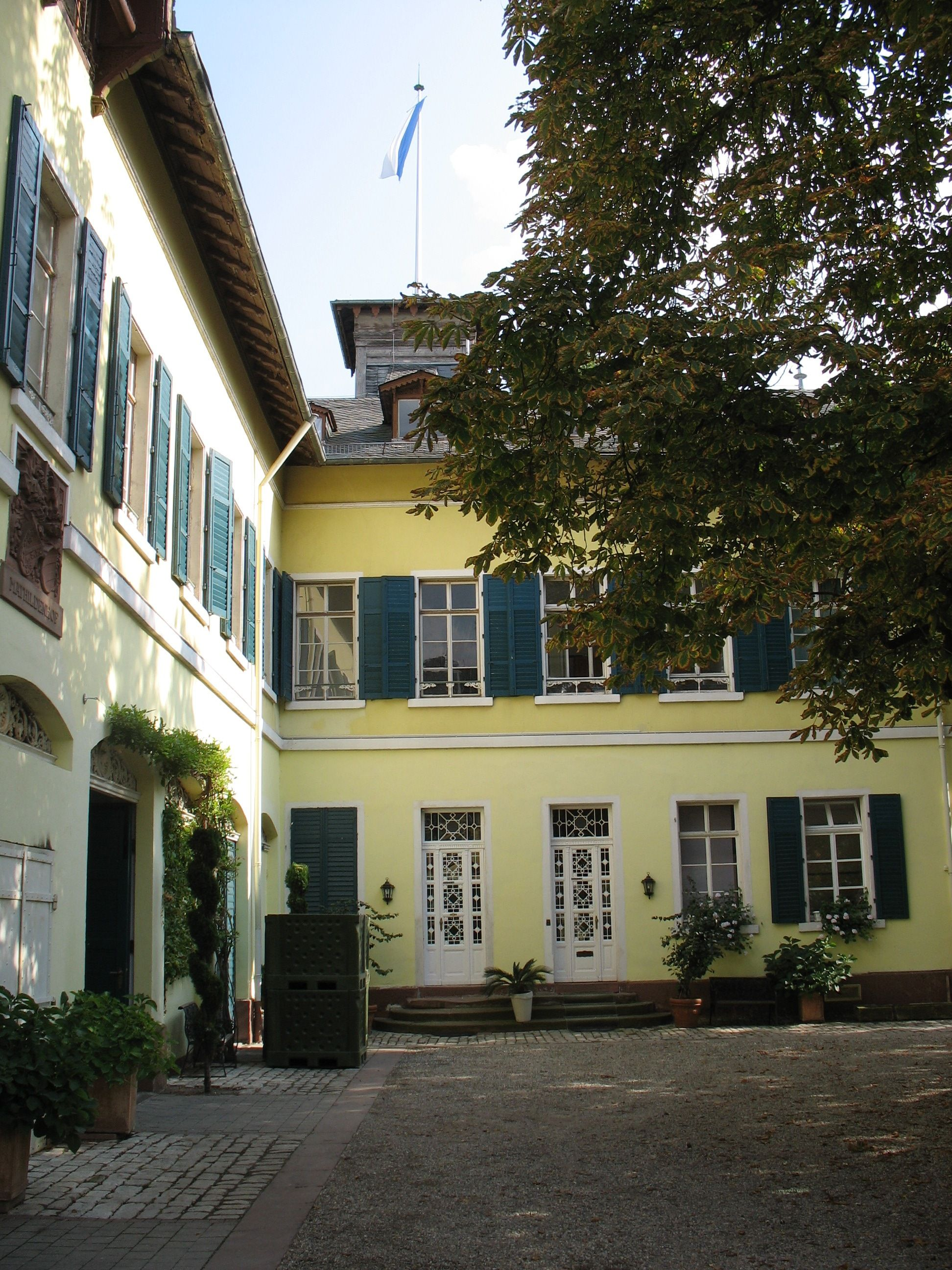 Weingut Heyl zu Herrnsheim, Hofansicht des Gutsgebäudes Langgasse 3